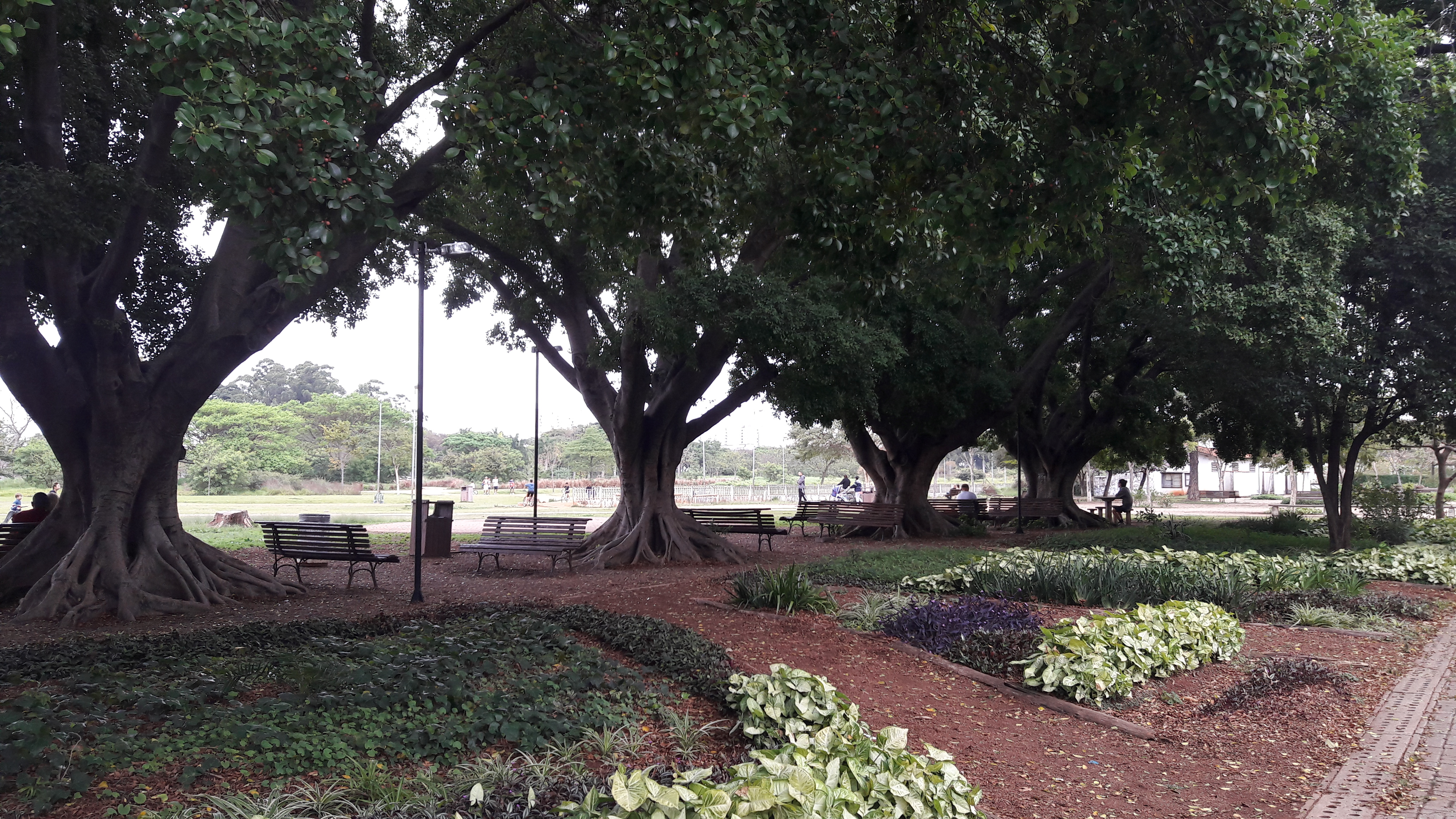 Área com bancos embaixo das árvores do parque do trote na Vila Guilherme, em São Paulo (SP), Brasil.